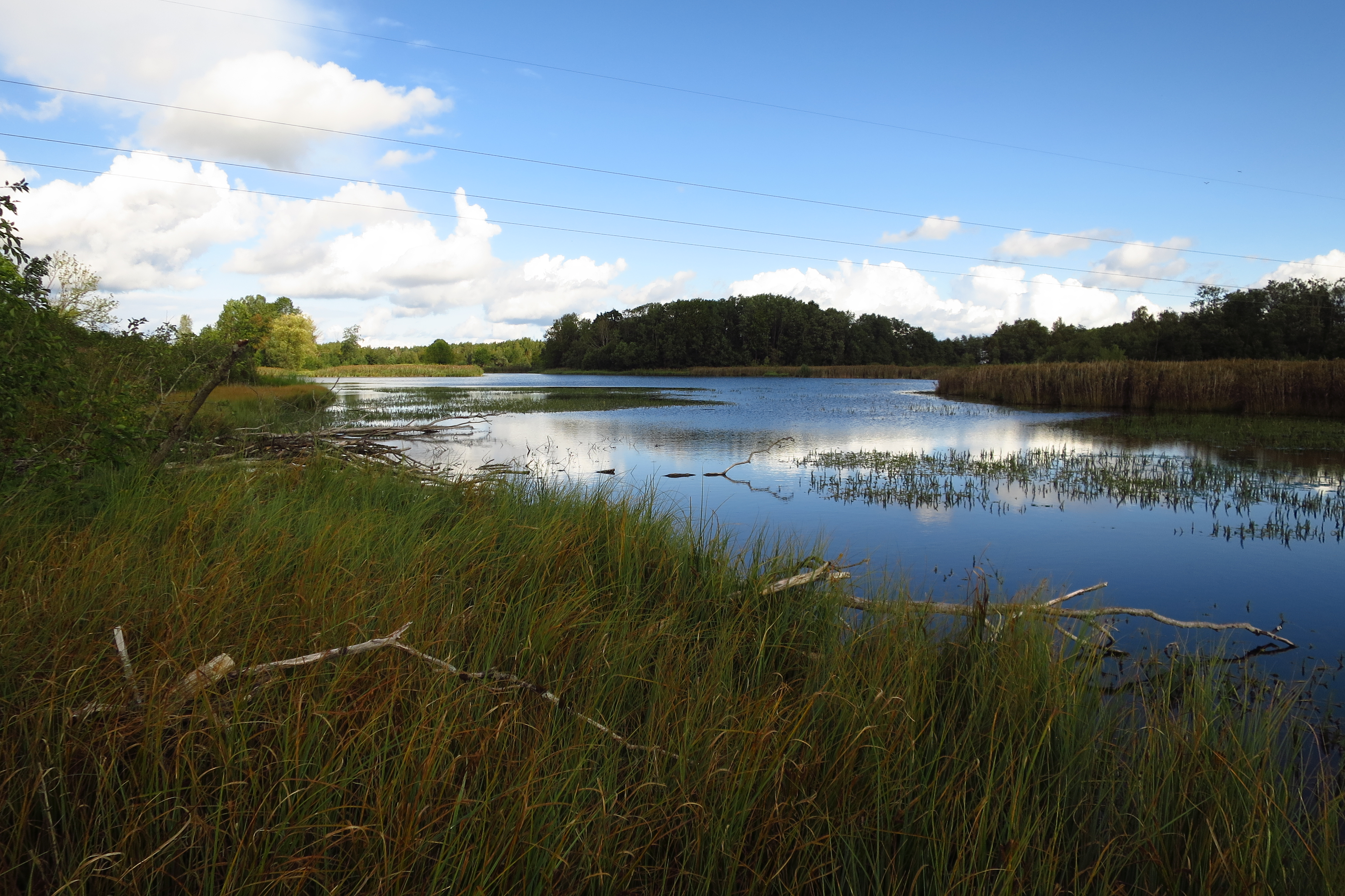 Vetiku Suurjärv Lääne-Virumaal